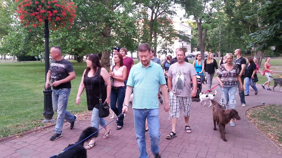 Protestní venčení - důvodem byla nespokojenost s chováním Arabských lázeňských hostů.